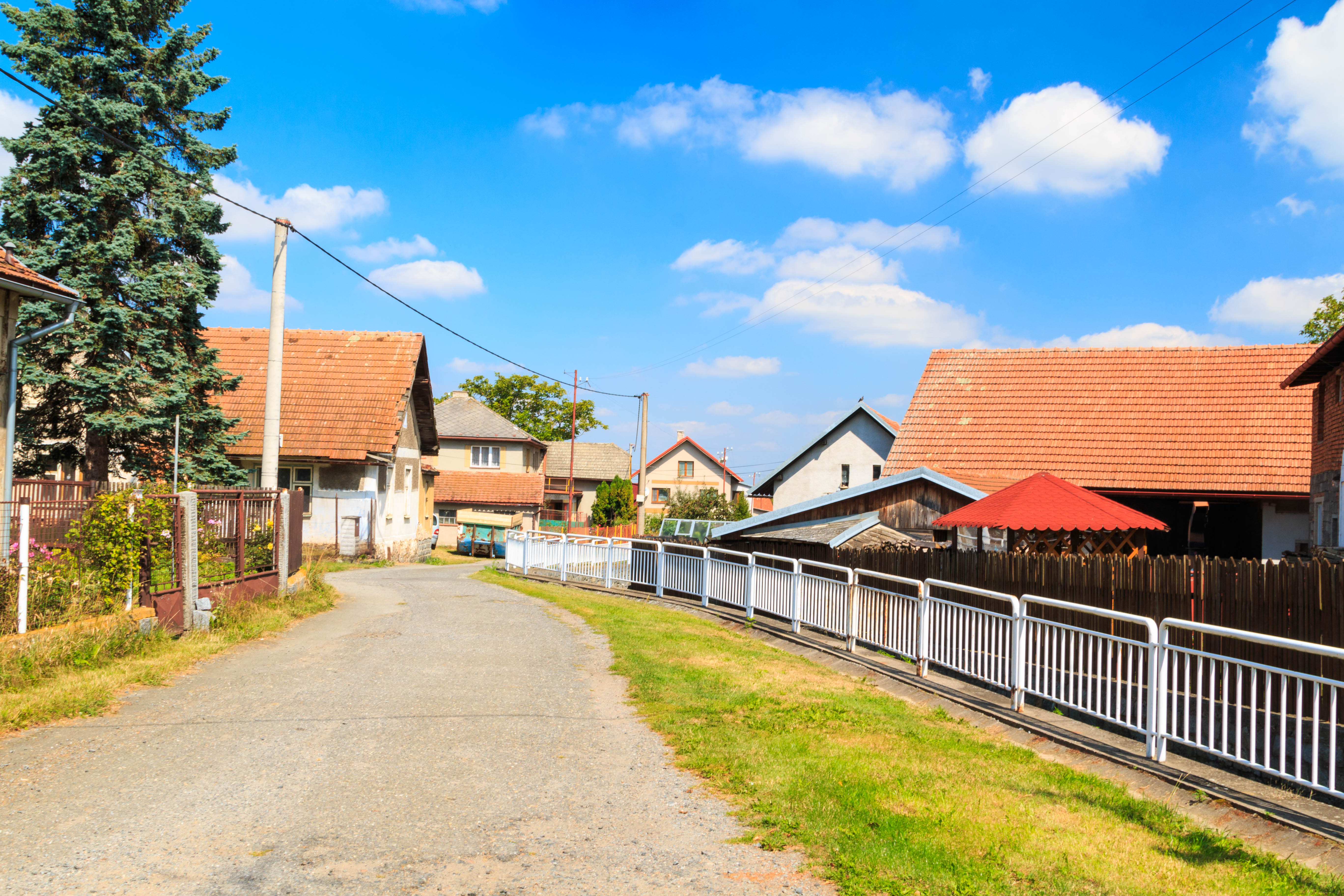 Pokřikov - čp. 86